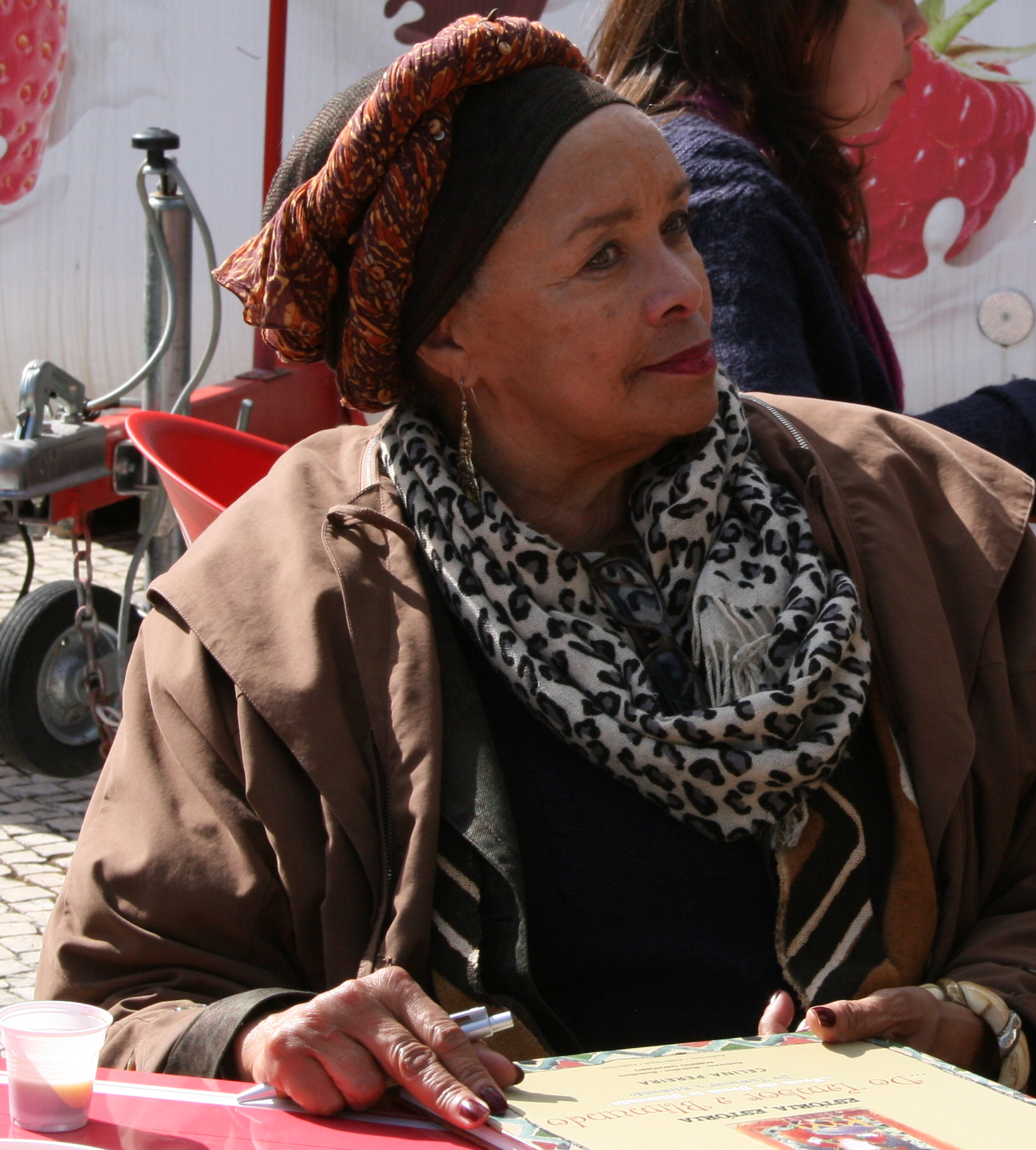 Celina Pereira autografando na Feira do Livro de Lisboa de 2012